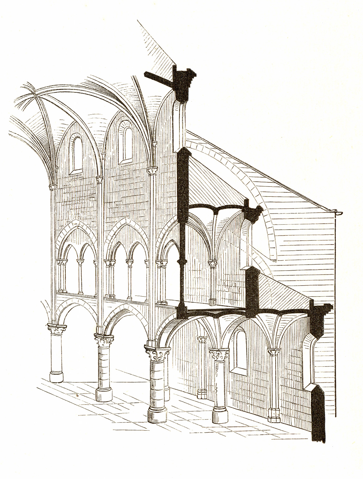 Zeichnung aus dem Jahrbuch der kaiserl. königl. Central-Commission zur Erforschung und Erhaltung der Baudenkmale III. 1859. 1-104. Zuordnung entsprechend Dateinamen August Essenwein (1831–1892) Alternative names August von Essenwein; August Ottmar von EssenweinDescriptionGerman architect and writerDate of birth/death 2 November 1831 13 October 1892Location of birth/death Karlsruhe NurembergAuthority control : Q105212 VIAF: 51804595 ISNI: 0000 0001 1062 3760 ULAN: 500014044 LCCN: n86016586 Open Library: OL2309247A WorldCat creator QS:P170,Q105212